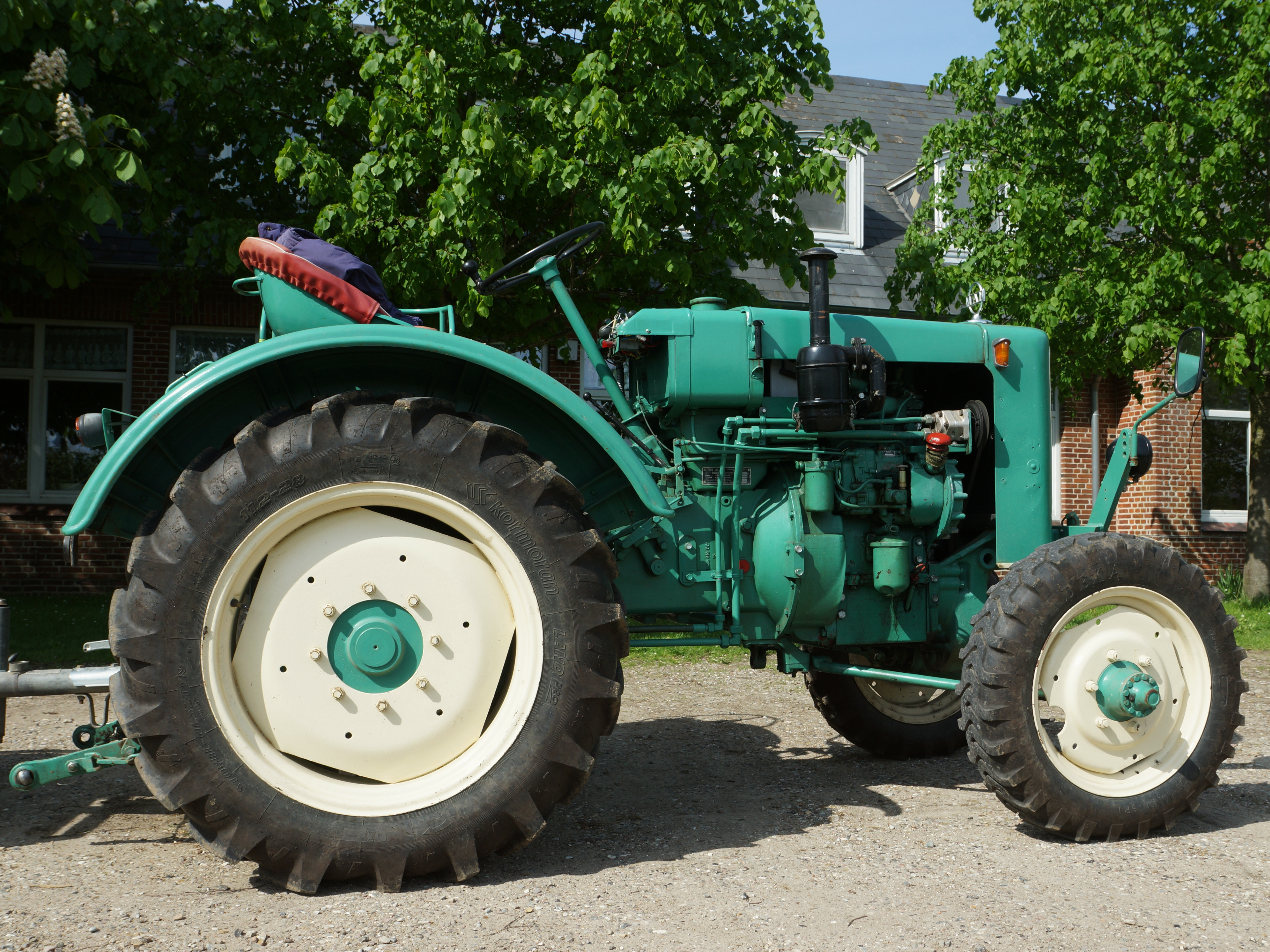 MAN Ackerdiesel Traktor Typ "A 25 A" Baujahr 1956 - Foto 2013 Wolfgang Pehlemann Steinberg/Ostsee DSC03678